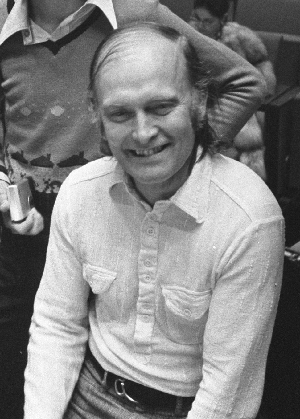 Collectie / Archief : Fotocollectie Anefo Reportage / Serie : [ onbekend ] Beschrijving : Repetities Unicef Gala ; Andy Williams (l) en neven Andy en David (r), midden dirigent Ken Thorne Datum : 4 april 1974 Trefwoorden : REPETITIES, dirigenten Persoonsnaam : Andy Williams, David Fotograaf : Verhoeff, Bert / Anefo Auteursrechthebbende : Nationaal Archief Materiaalsoort : Negatief (zwart/wit) Nummer archiefinventaris : bekijk toegang 2.24.01.05 Bestanddeelnummer : 927-1109